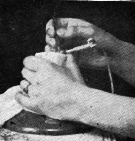 Illustration af opmaskning af strømper